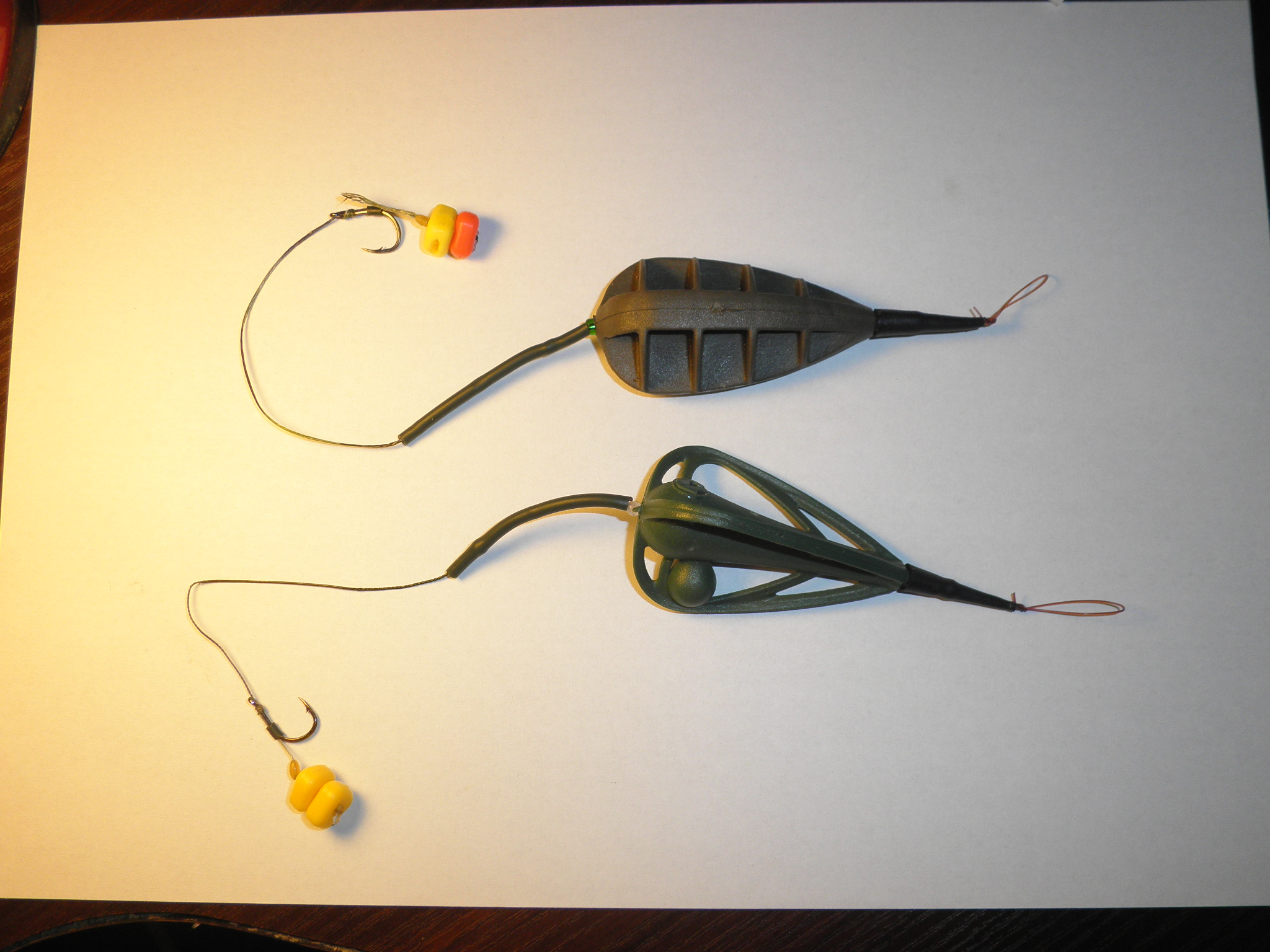 Методная кормушка с поводком